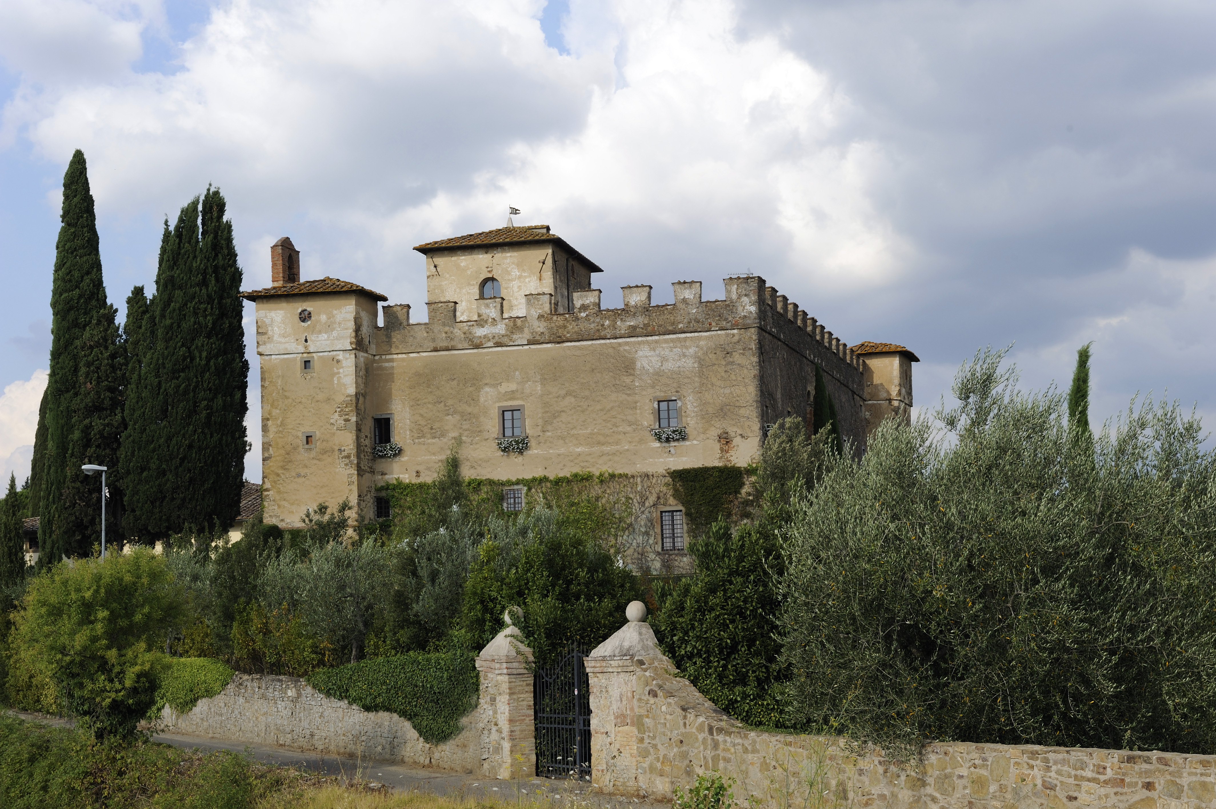 Castello della Paneretta, Barberino Val d'Elsa